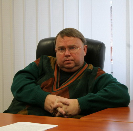 1-й министр иностранных дел ПМР